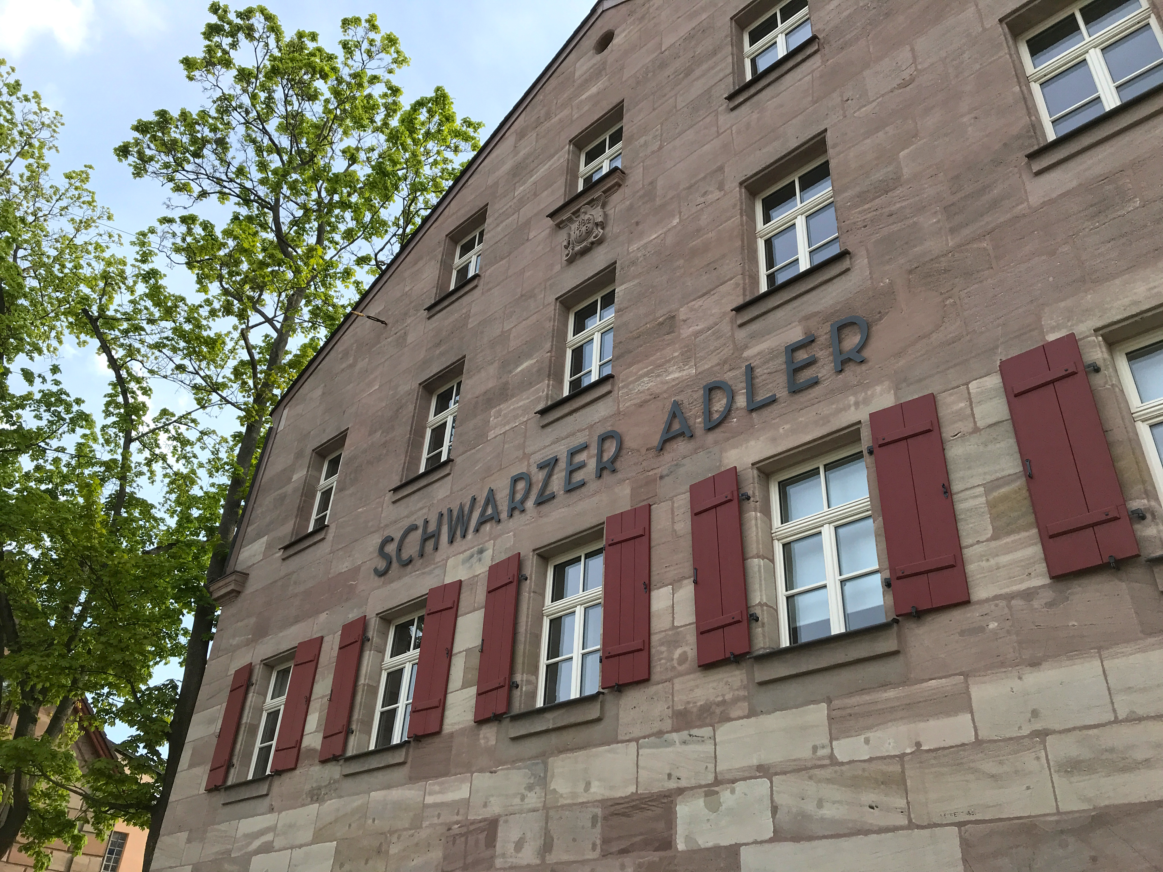 2019 wurde die neue Schrift aus Metall (nicht mehr aus Holz) angebracht.